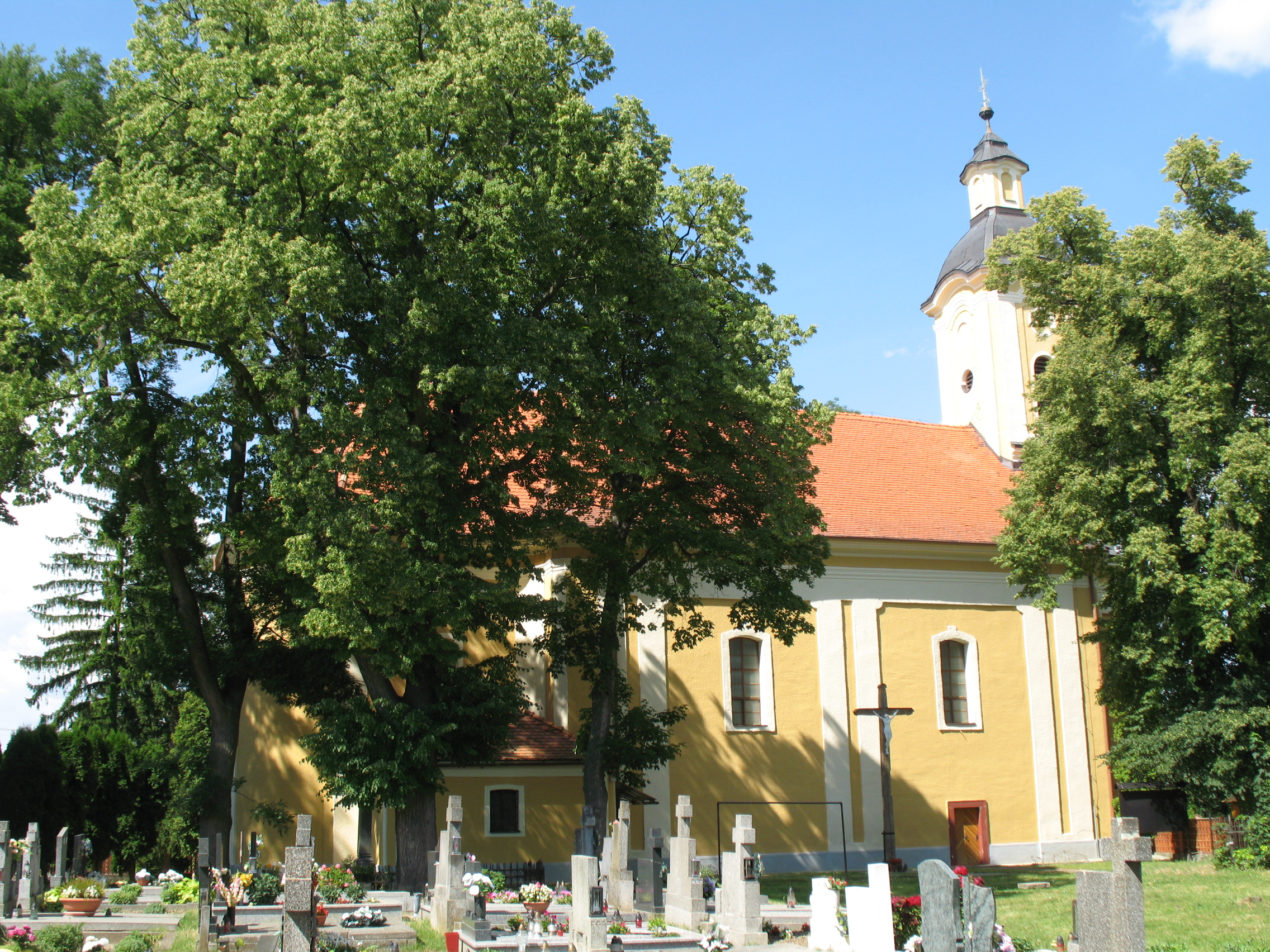 Szentmihályúr